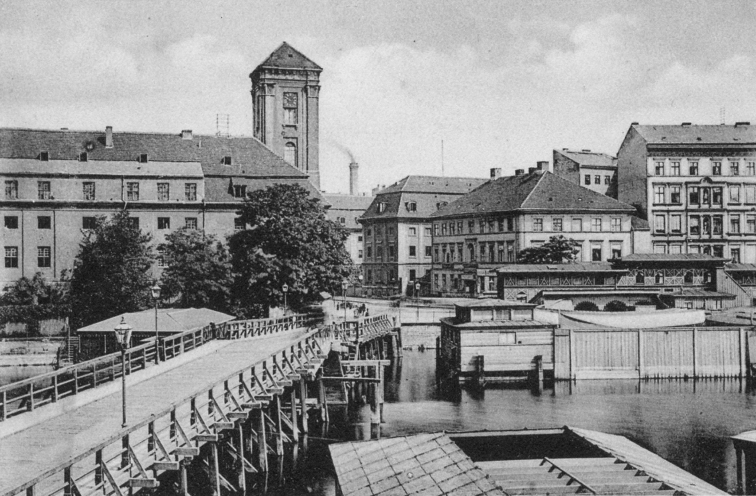 Blick von Süden auf die Waisenbrücke in Berlin